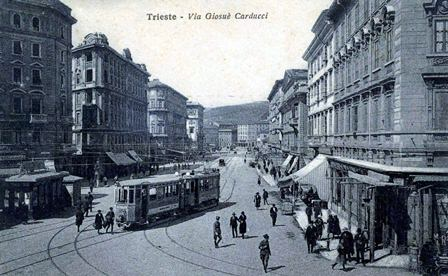 Trieste - Via Carducci